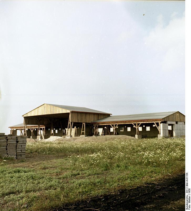 Torno, Rinderoffenstall Rinderoffenstall in Großblockbauweise-Torno, Kreis Neu-Ruppin [Torno.- Rinderoffenstall in Großblockbauweise, Kreis Neu-Ruppin]